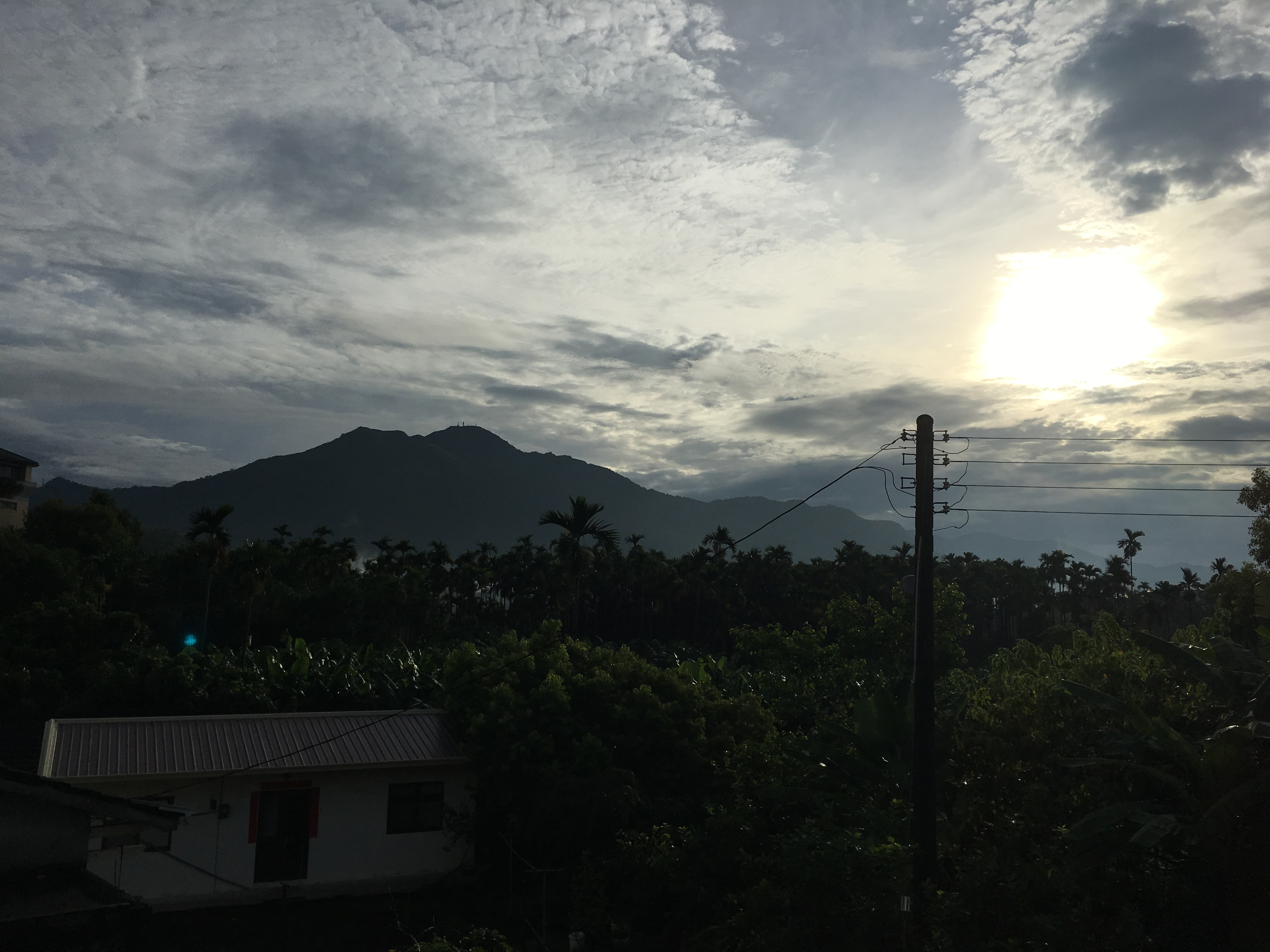 早晨的集集大山